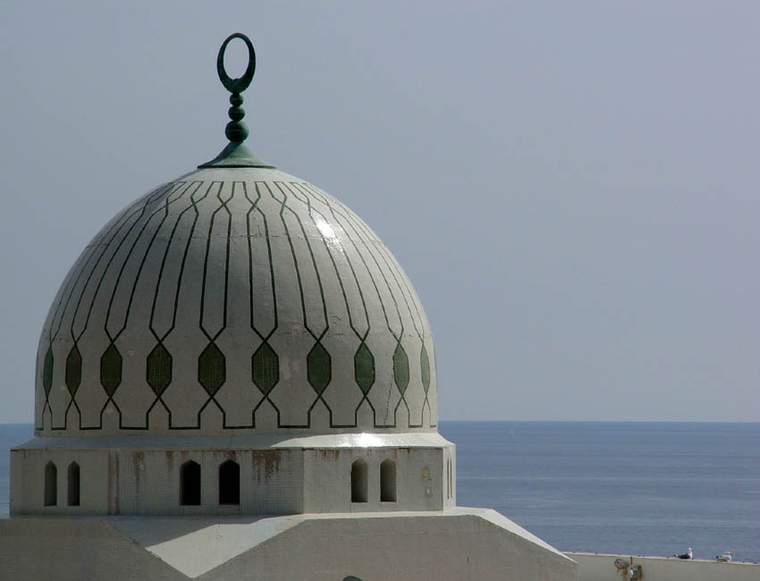 Gibraltar